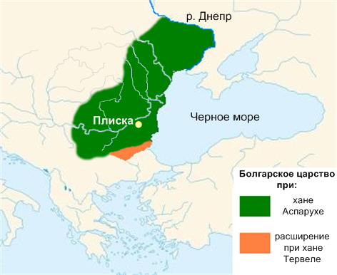 Болгарское царство при князе Аспарухе и князе Тервеле